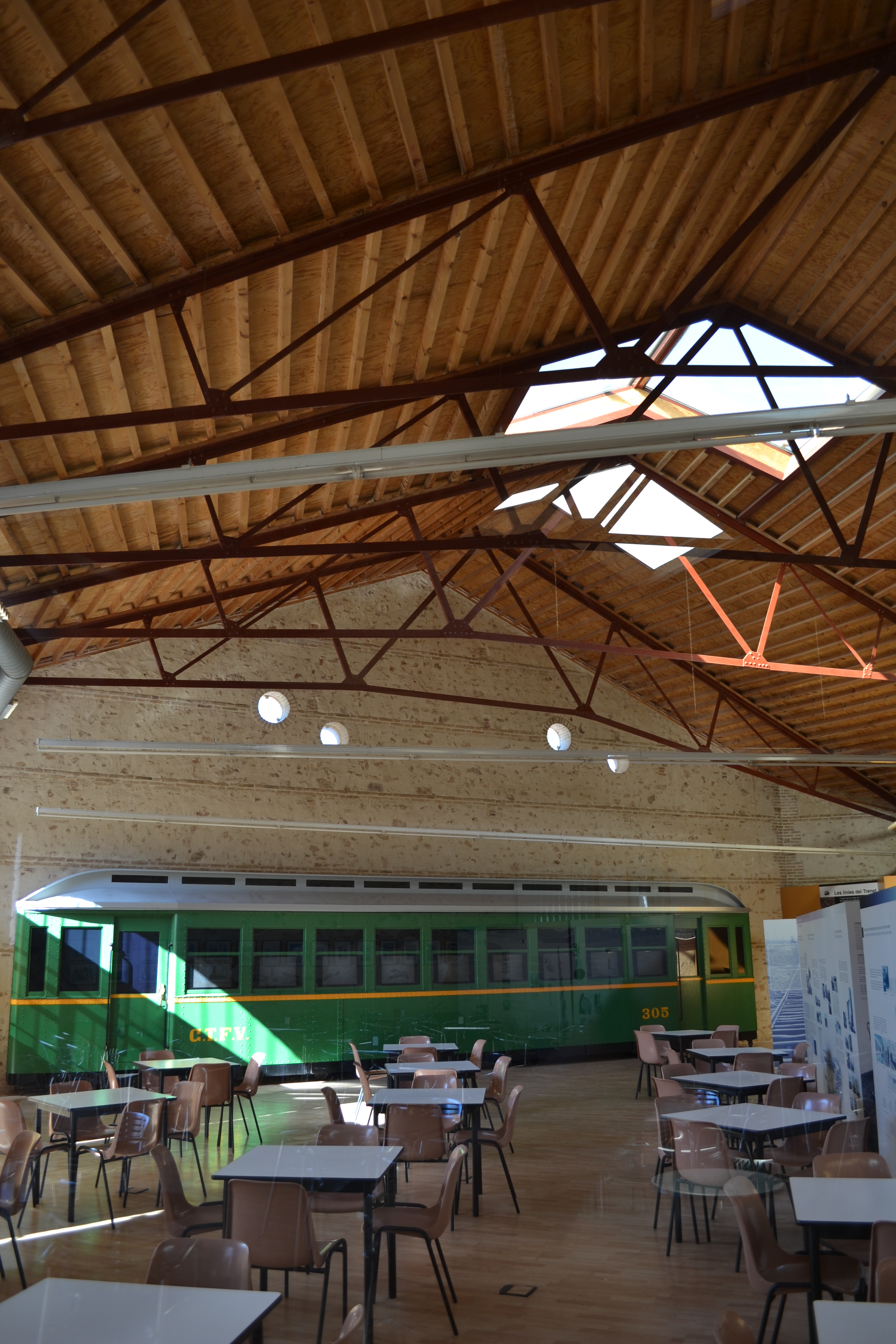 Museo del Trenet en desuso: ya no se destina a exposiciones; en la actualidad es un bar. Parque de Marxalenes.